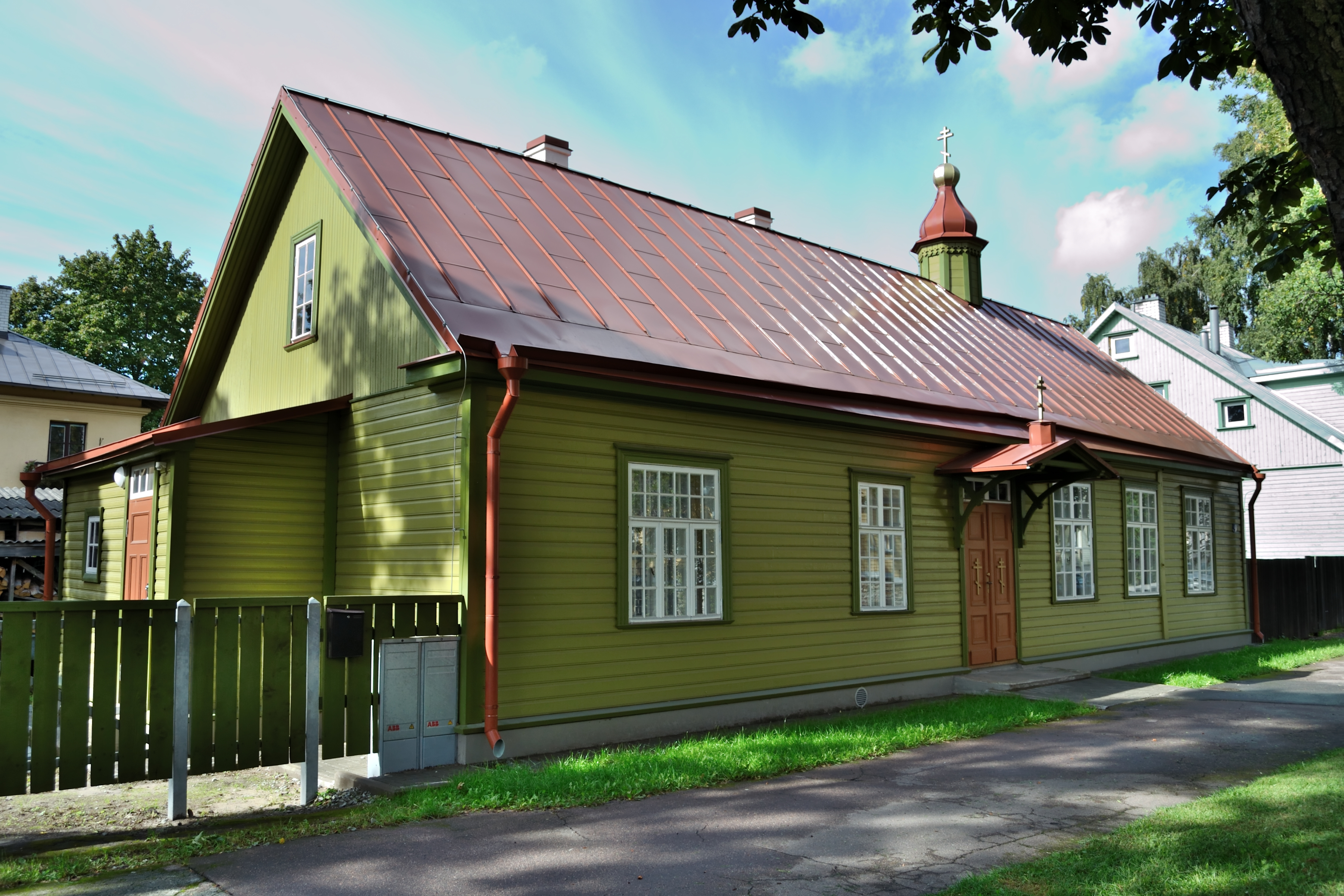 Tallinna vanausuliste palvela